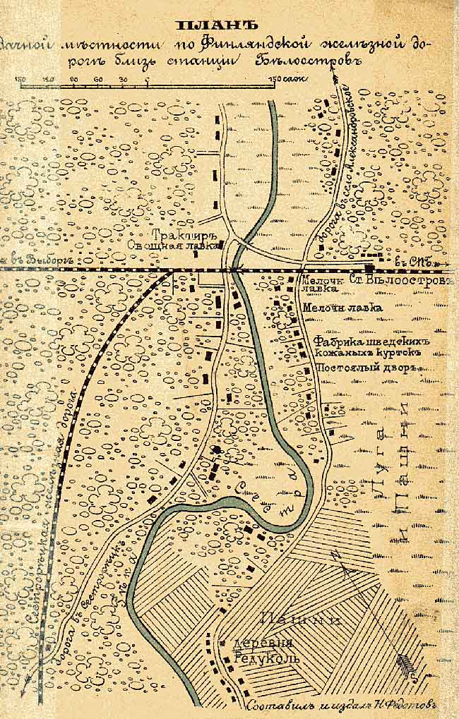 Примыкание сестрорецкой ветки к основной магистрали